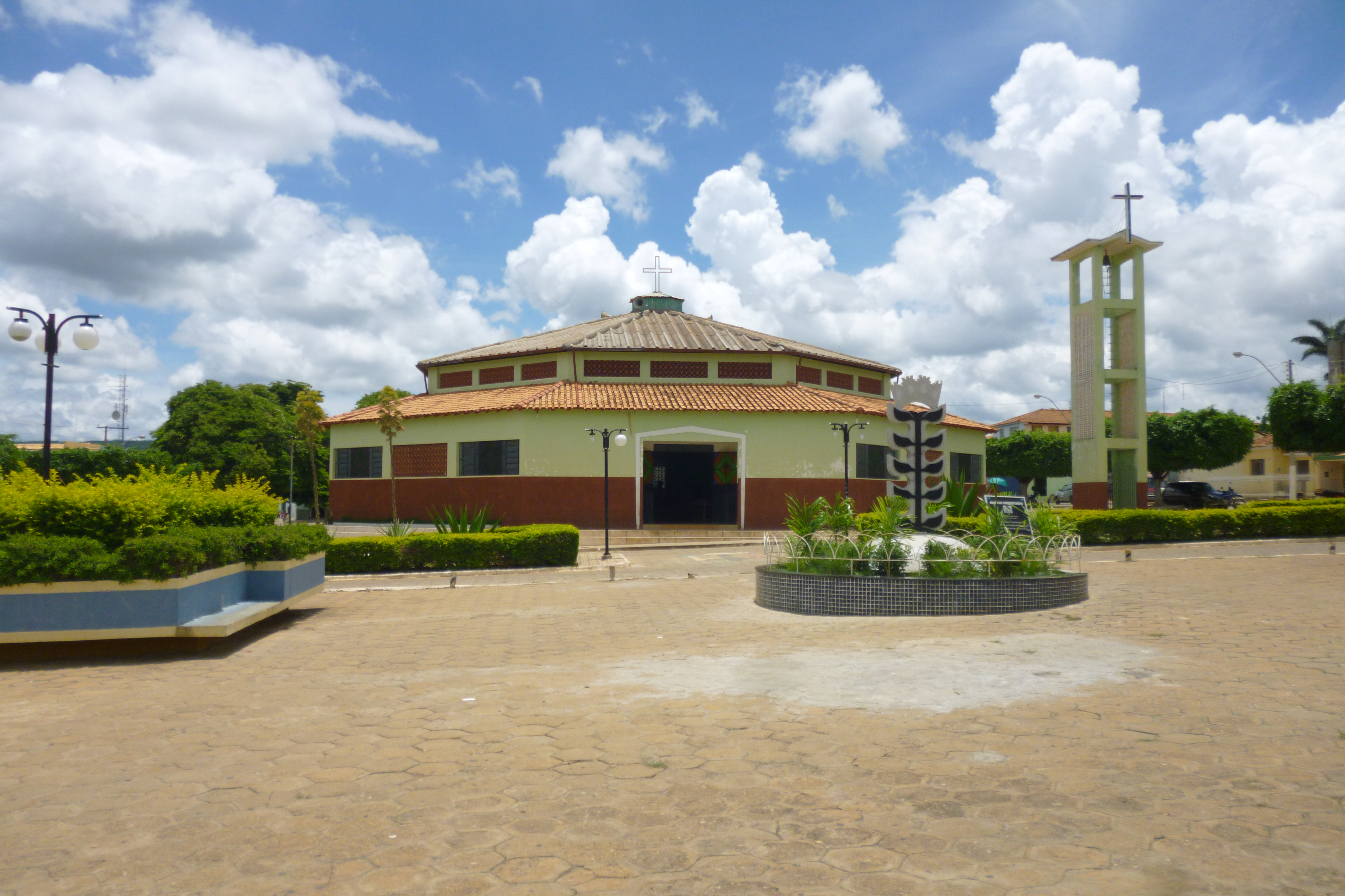 Praça e Igreja Matriz de Mortugaba, Bahia, Brasil.